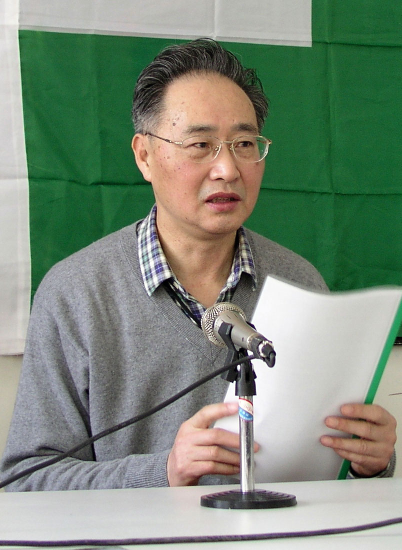 (fotita de Vikipediisto:Celumio)